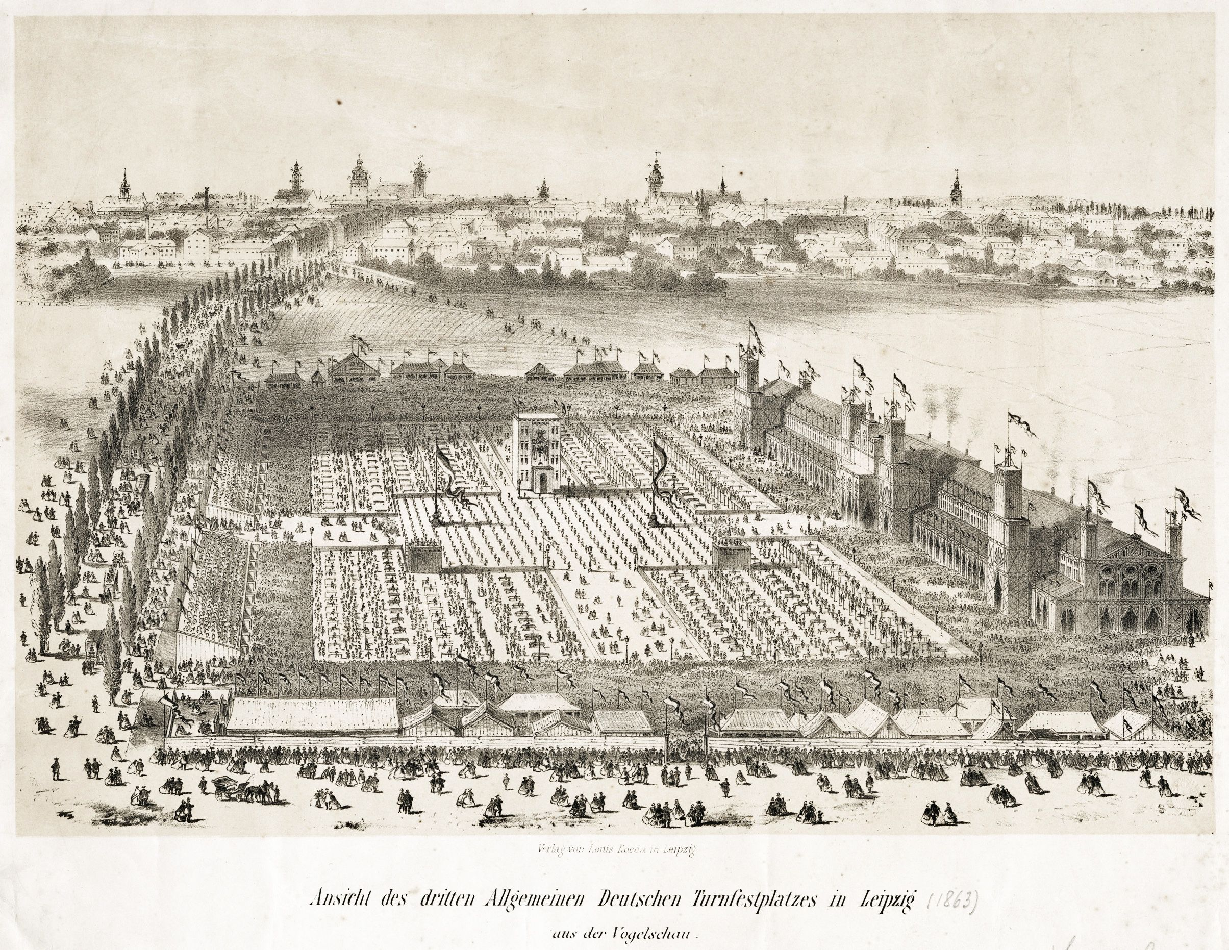 Allgemeines Deutsches Turnfest 1863, Vogelschauansicht des Festplatzes